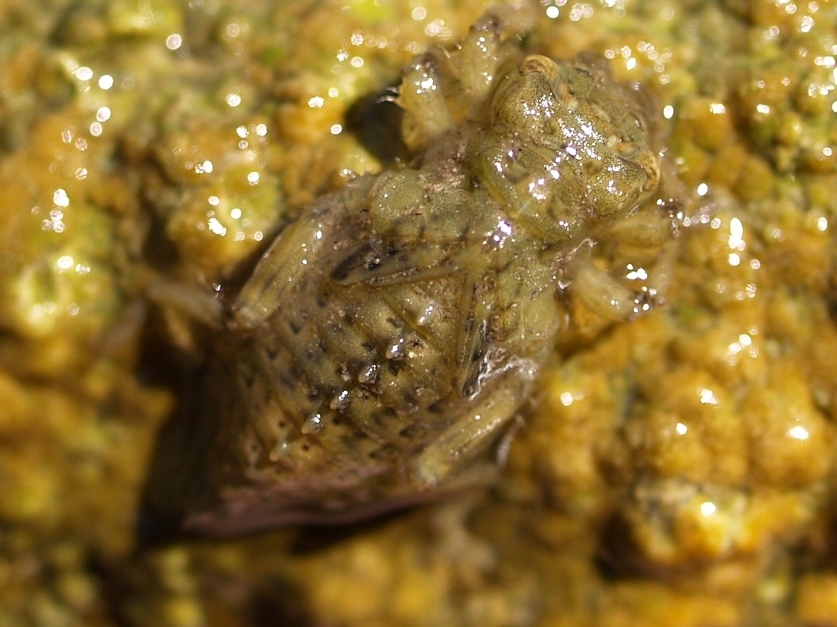 Onychogomphus uncatus nimfa